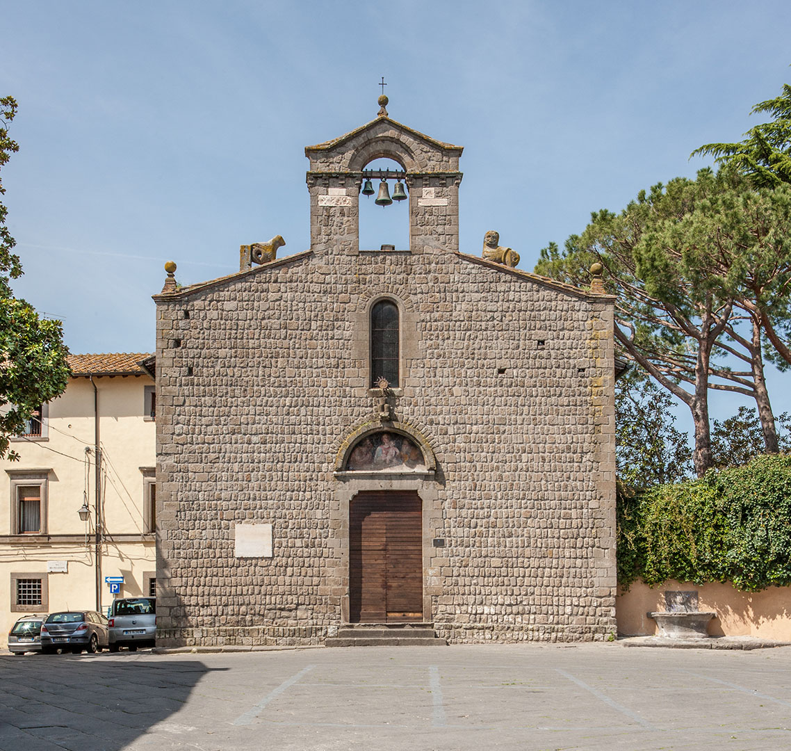 La Chiesa di San Silvestro